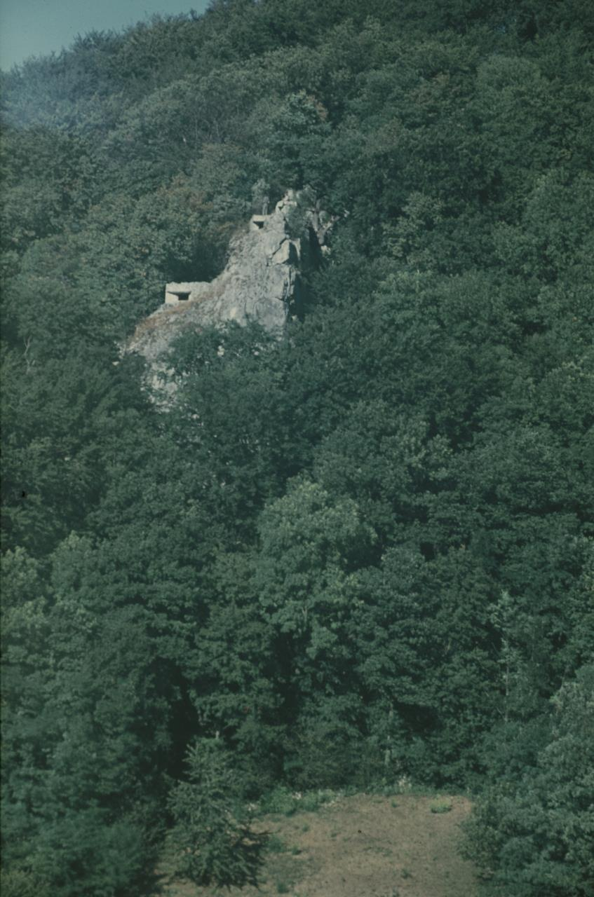 Fotografie, Archäologie und Museum Baselland, Schweiz: Zweiter Weltkrieg